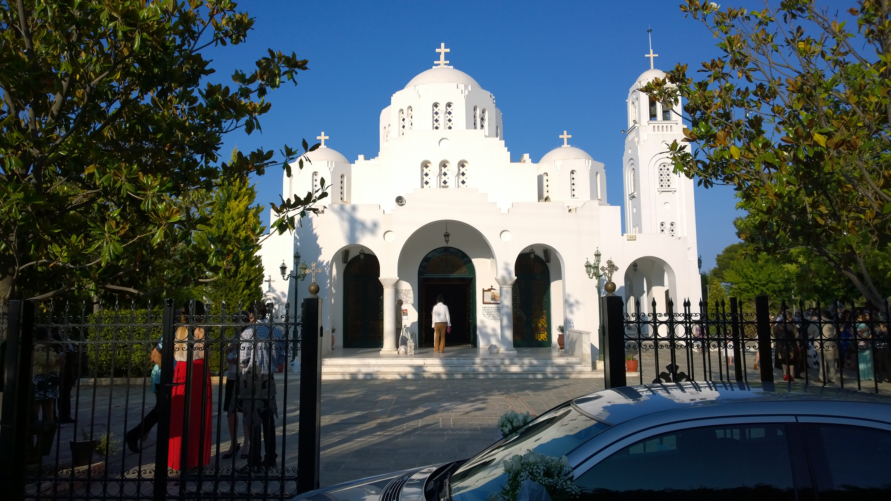 Koimiseos Theotokou, Mati